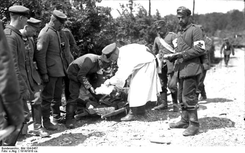 I. Weltkrieg 1914-1918 Verbinden eines Verwundeten (Verbandsplatz Waldheim)